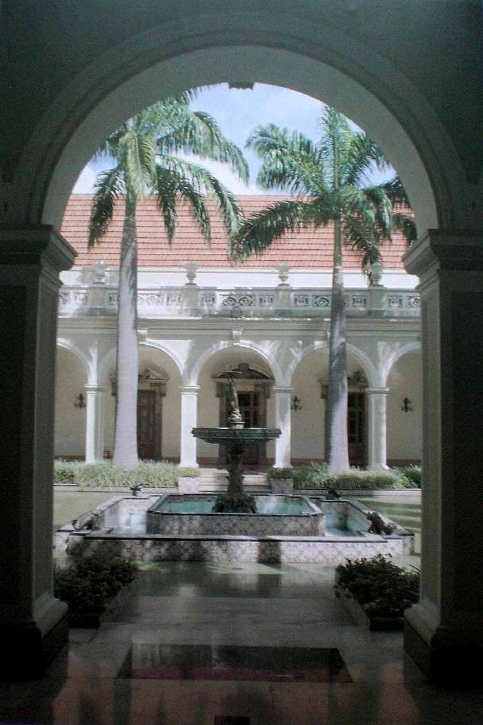 Patio Central, Palacio de Miraflores, Caracas.